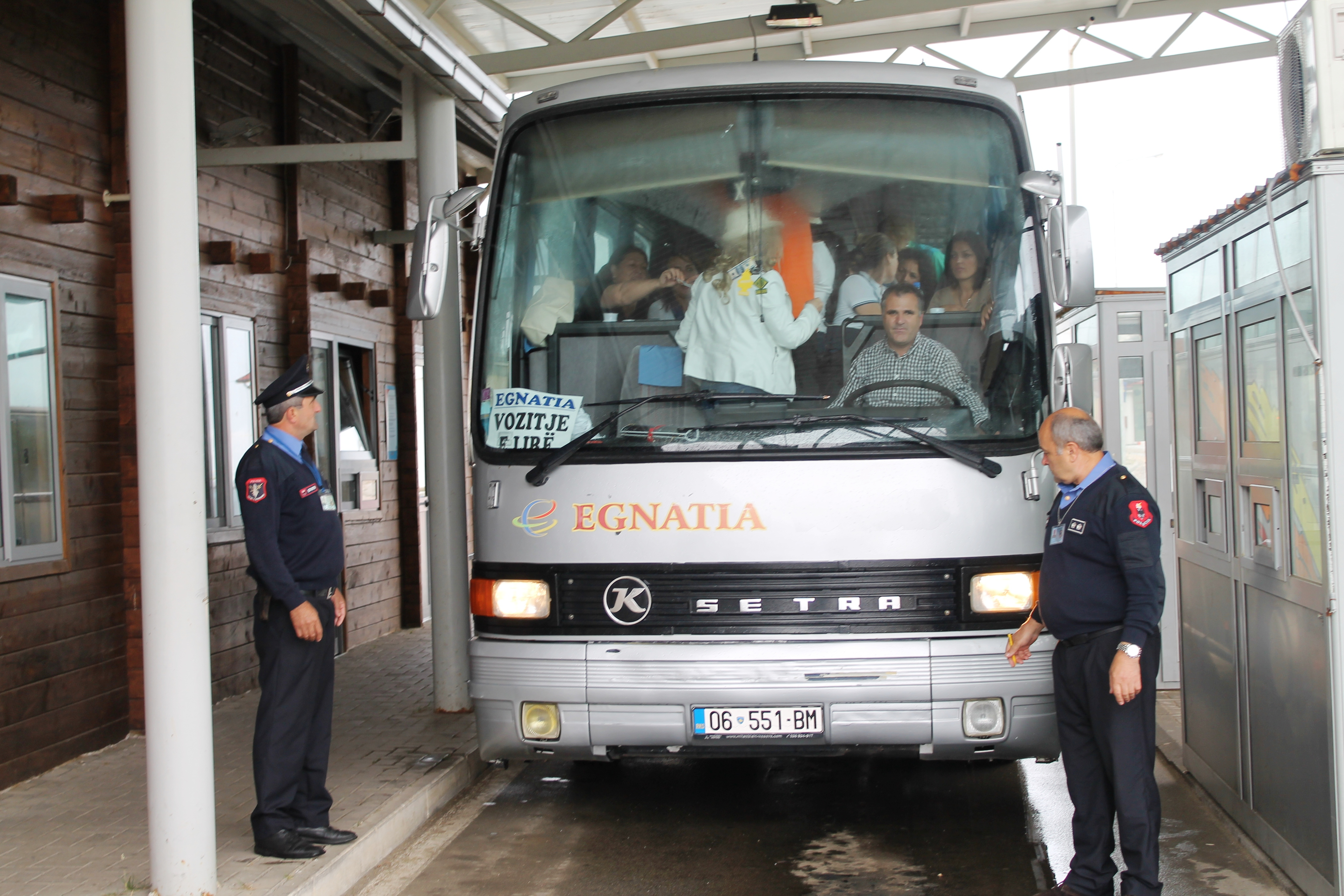 Vendkalimi kufitar në Kosovë-Shqipëri- Qafa e Morinës